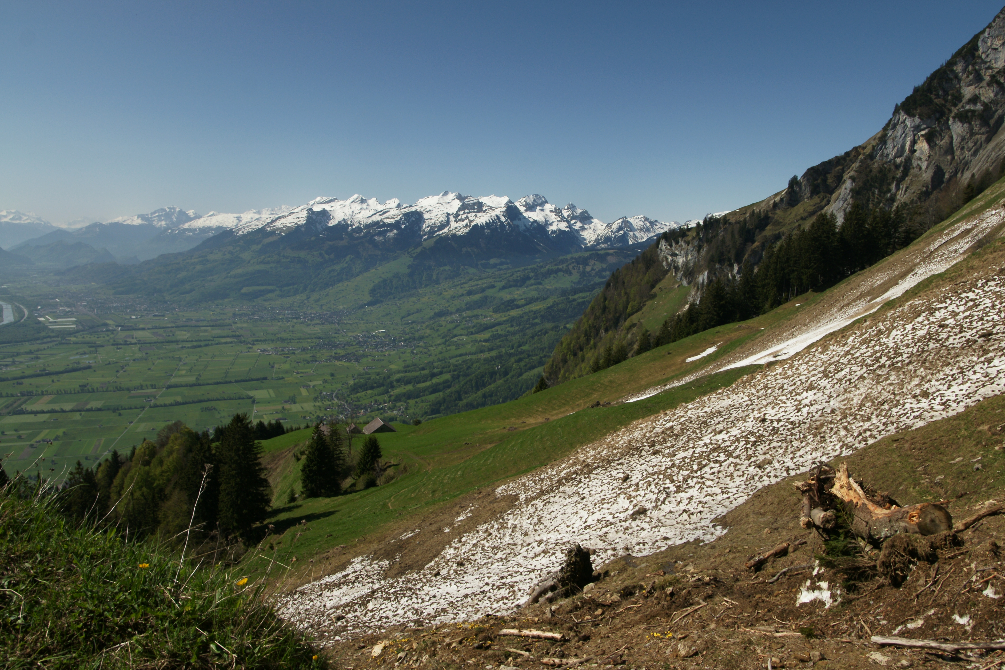 Lawinenschuttkegel in der Frümsner Alp. Blick auf die Vorderalp, das Rheintal und die Alviergruppe.